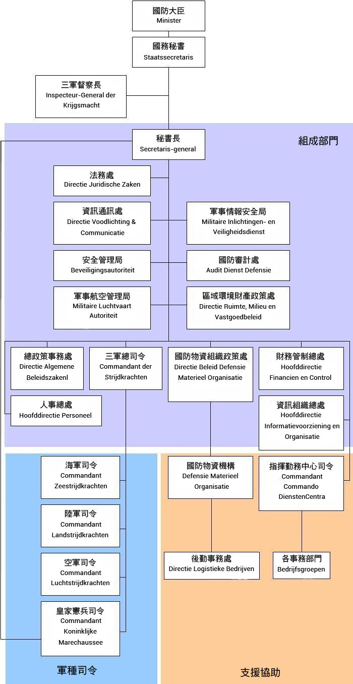 荷蘭國防部組織圖，參考自 [1]